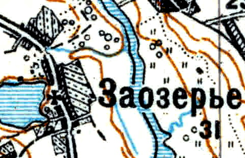 Топографическая карта Ленинградской области, квадрат Vc-29 (Батецкая), деревня Заозерье